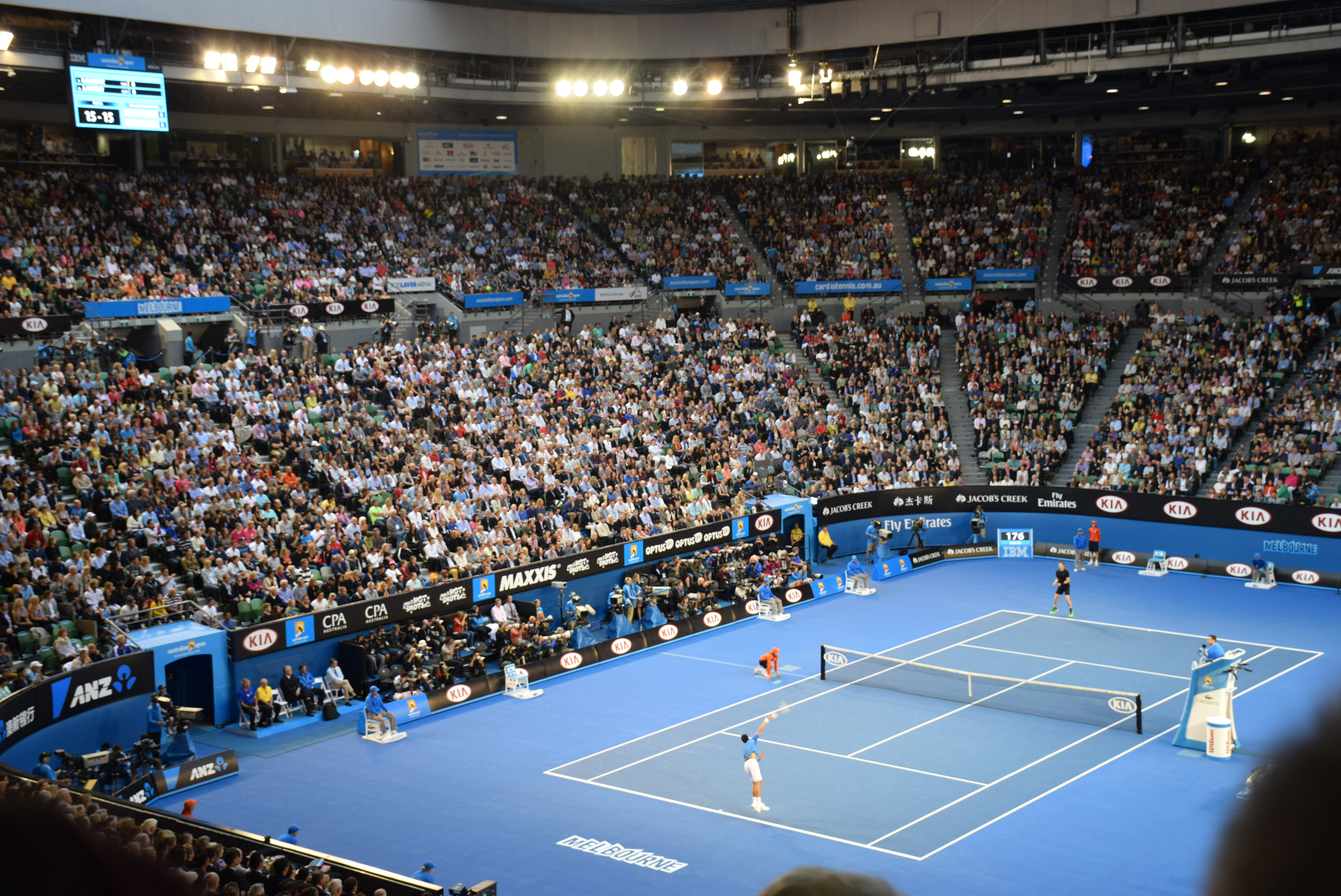 Australian Open 2015